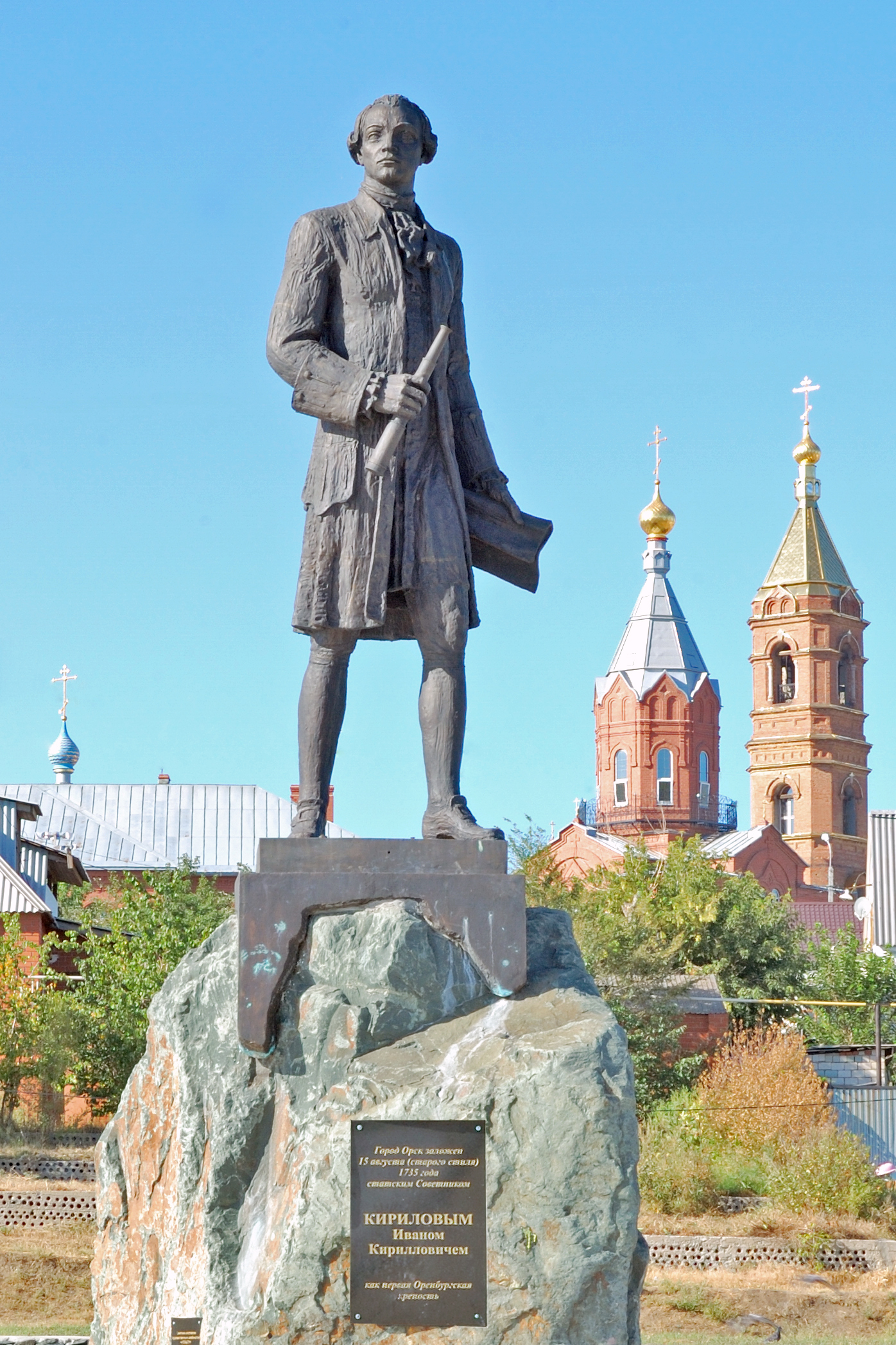 Памятник Кириллову И.К. в городе Орске